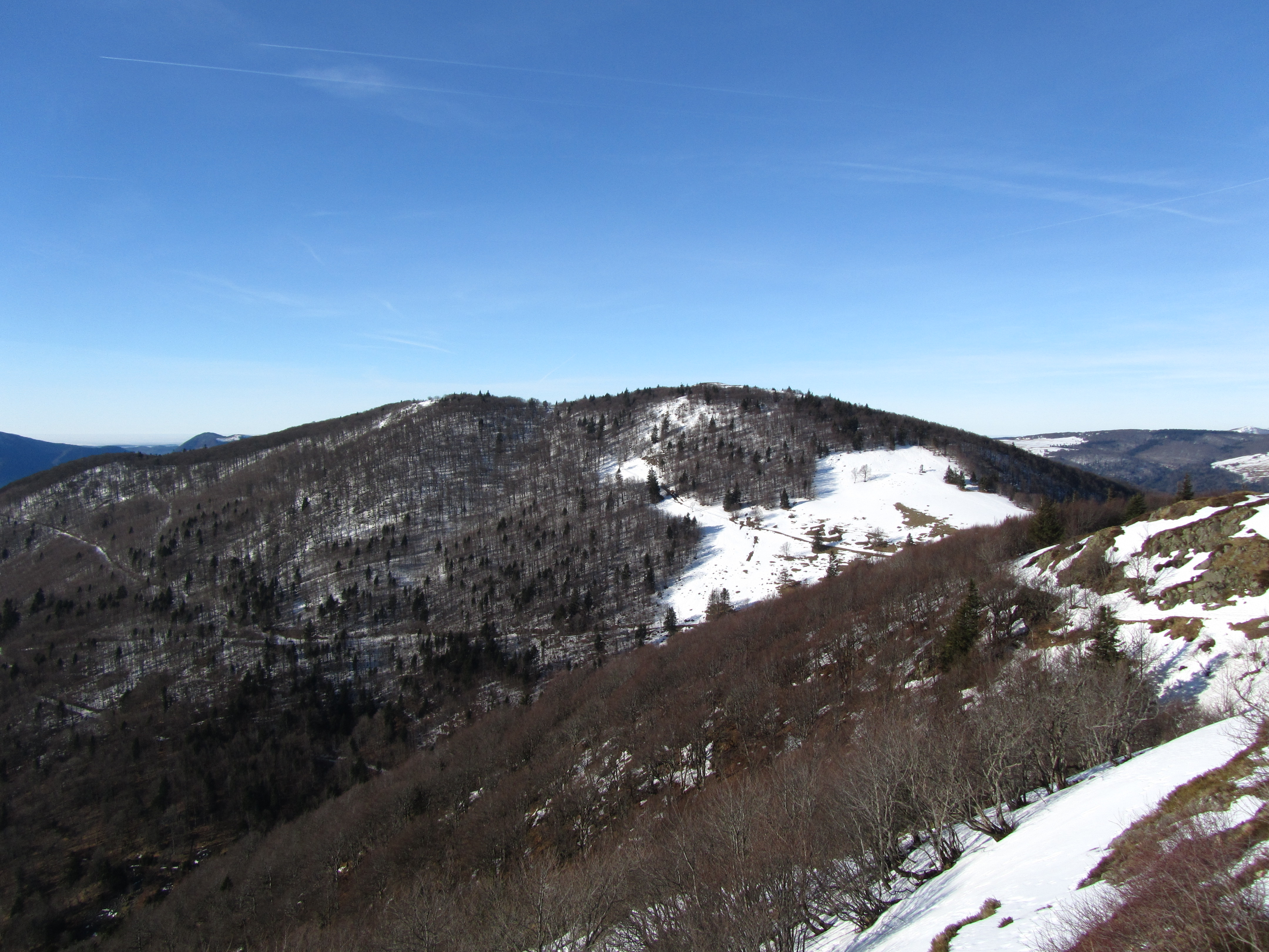 Der Storkenkopf in den Vogesen von Ost-Südost. (Aufstieg zum Grand Ballon)